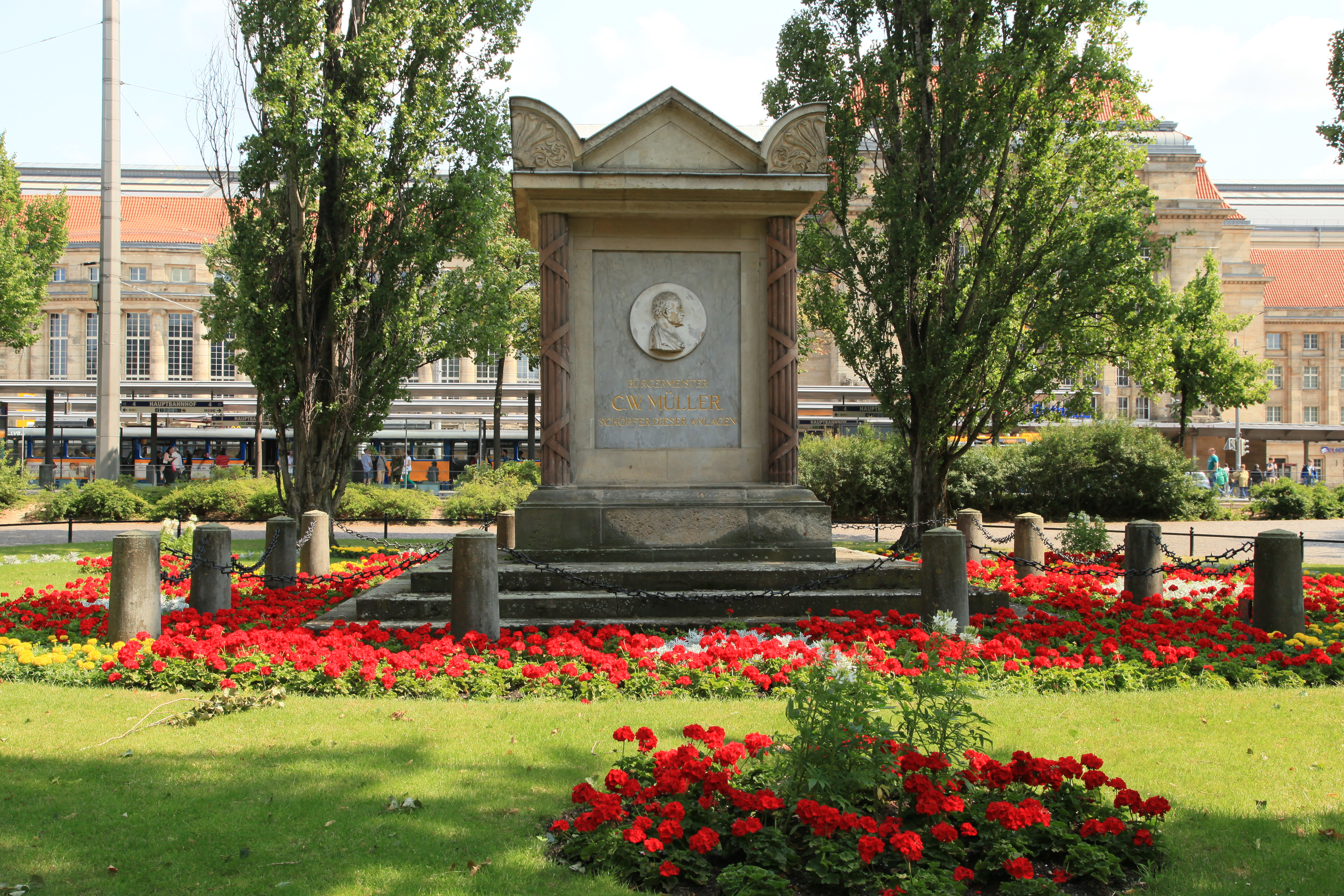 Carl-Wilhelm-Müller-Denkmal, Müllerpark in Leipzig